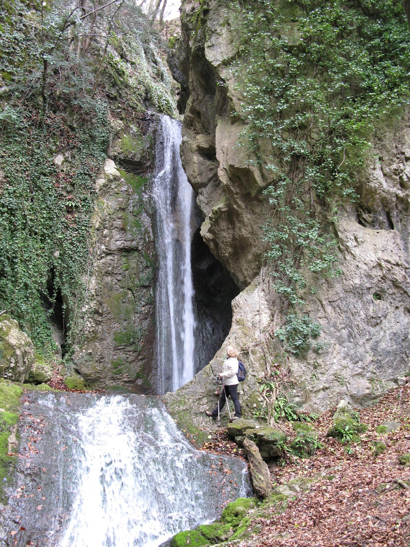 Slap Bojanca pod Bohorjem